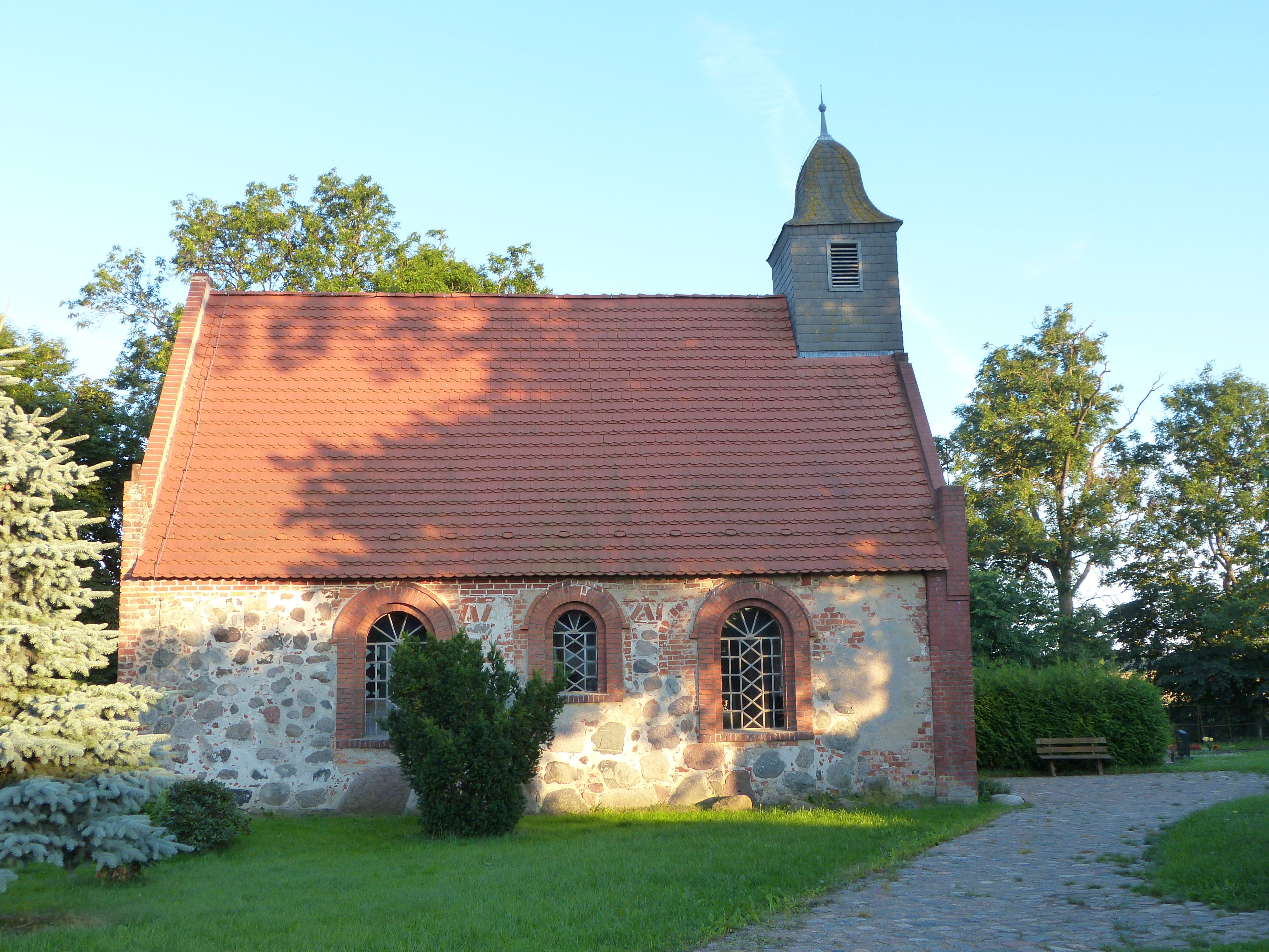 Kirche in Seltz, Gemeinde Gültz, Nordseite